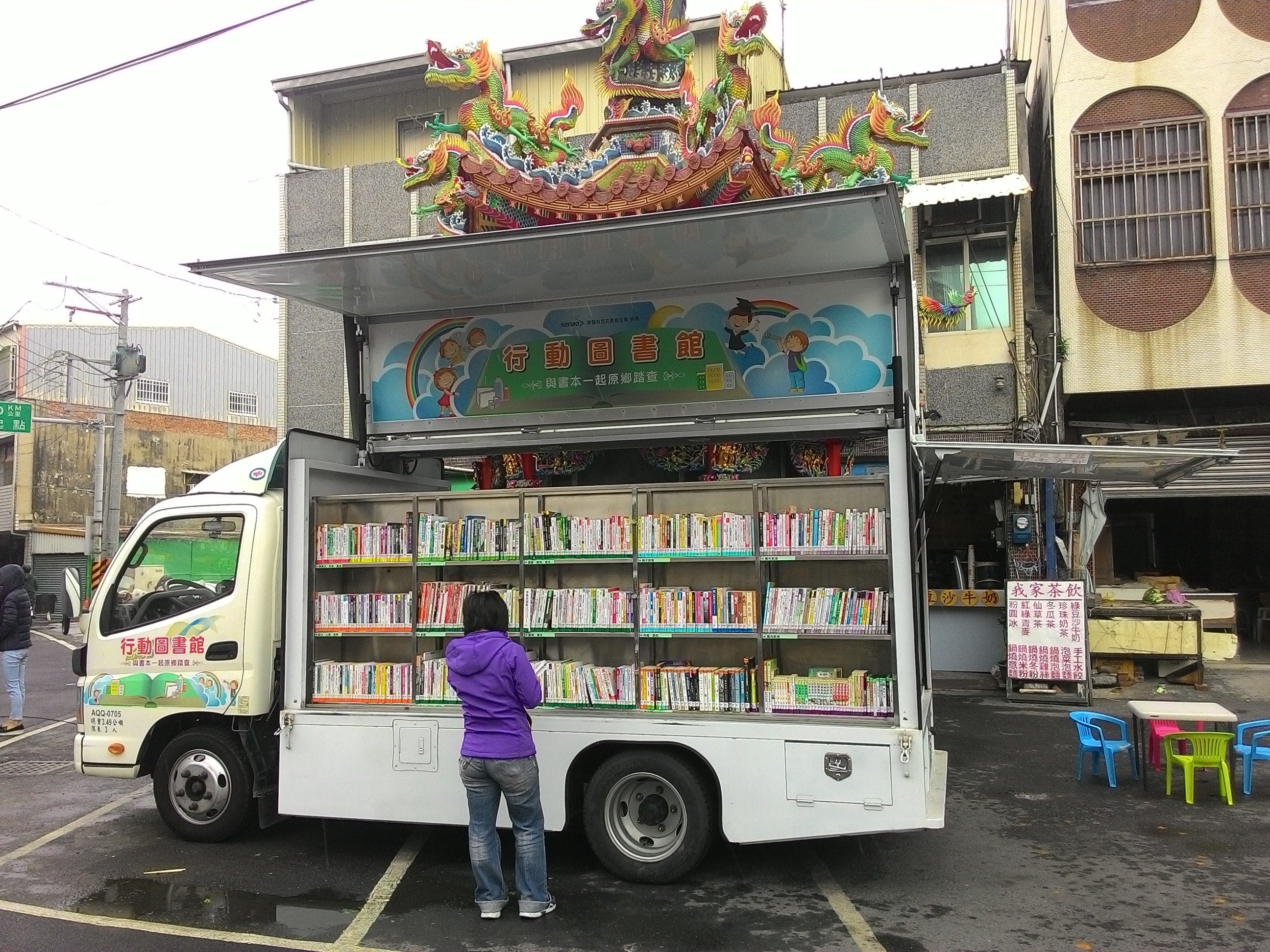 臺南市圖行動圖書館，福田Aumark行動圖書車AQQ-0705，停靠於將軍區馬沙溝李聖宮